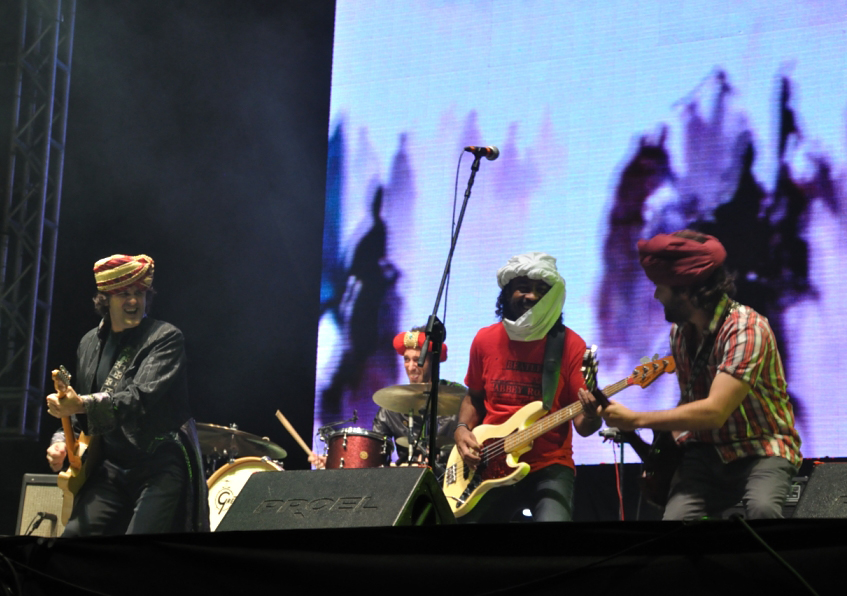 Ciro y Los Persas en Cosquin Rock 2011.